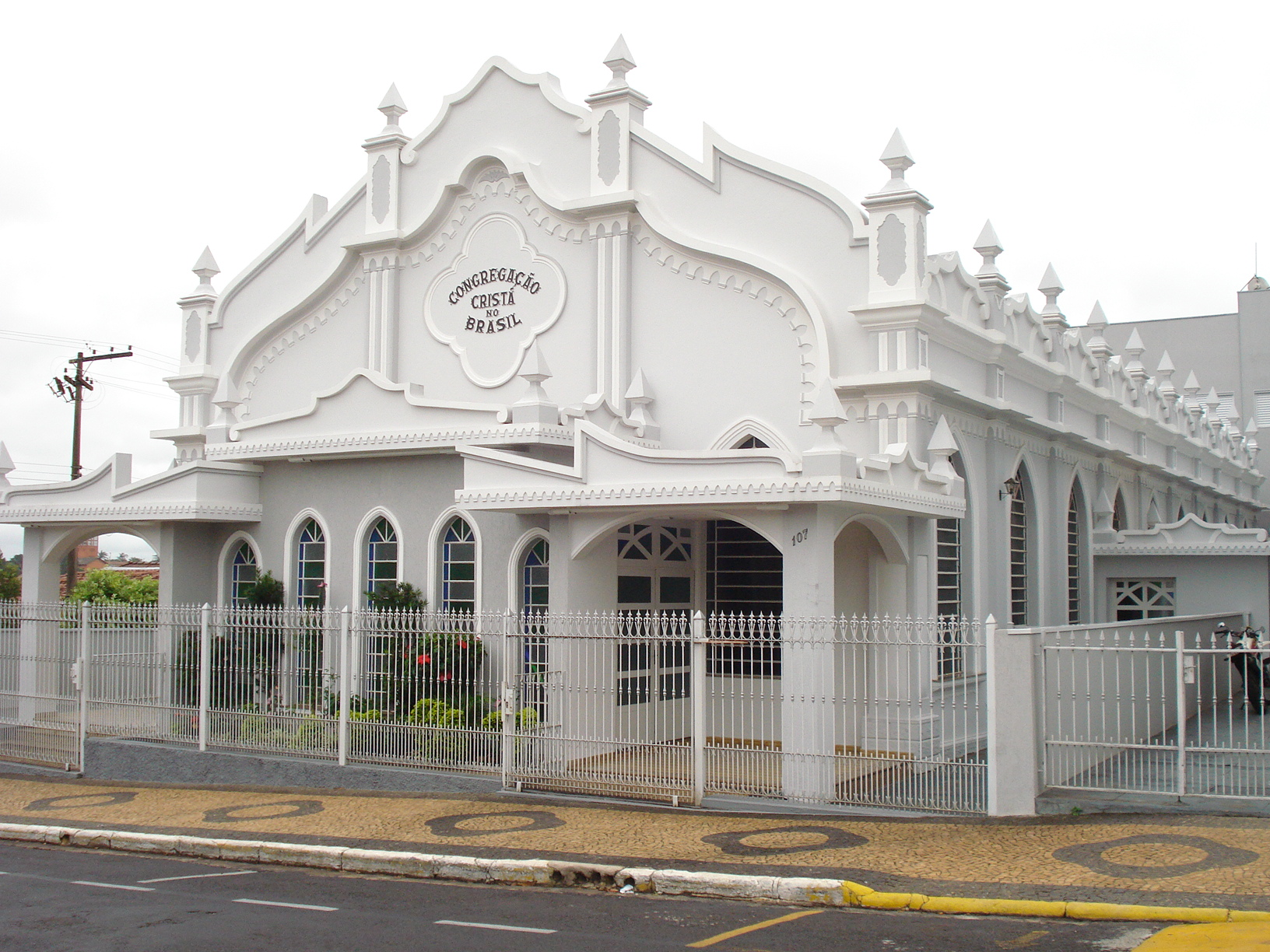 CCB Central - Catanduva III (clique na foto)